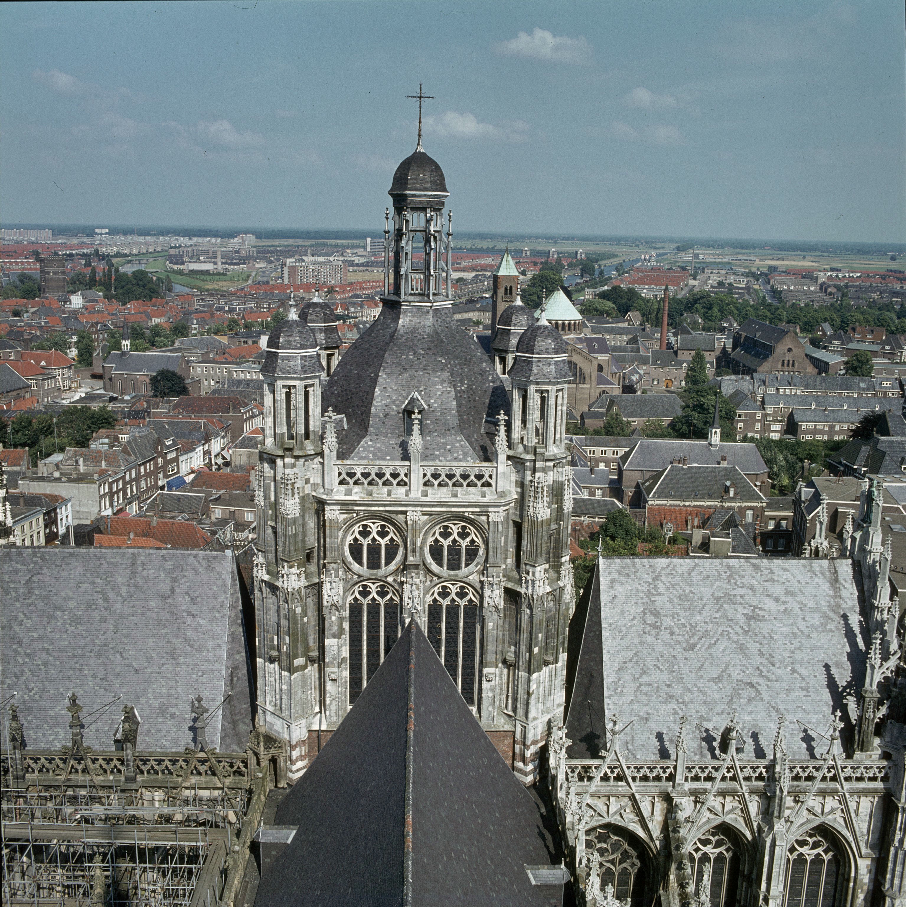 Sint Janskathedraal: Overzicht van de vieringtoren, gezien vanaf de westtoren